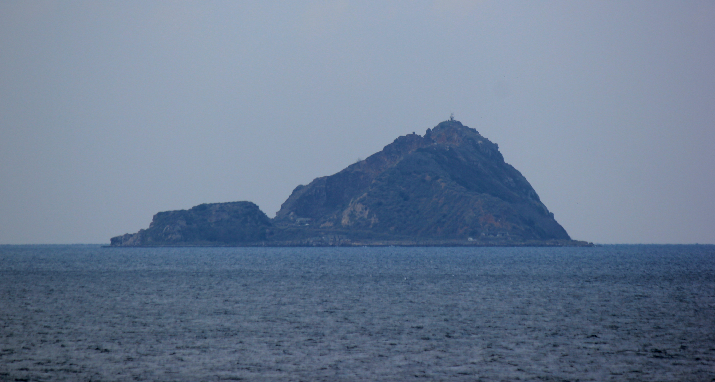 Ostansicht der Insel Sivriada im Marmarameer vor Istanbul.